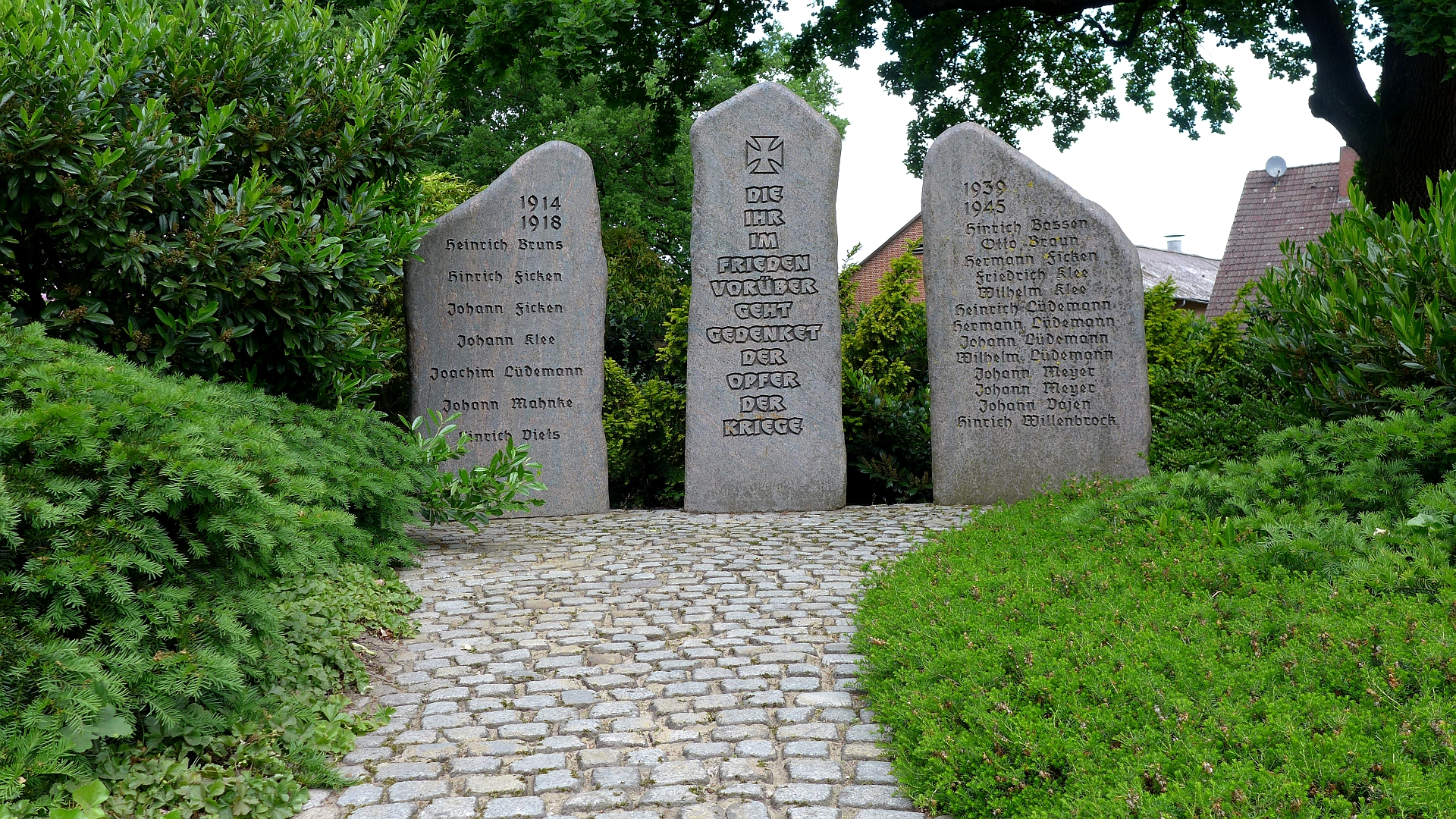 Stätte zum Gedenken der Gefallenen in den Weltkriegen I und II. Inschrift: "DIE IHR IM FRIEDEN VORÜBER GEHT, GEDENKET DER OPFER DER KRIEGE". Es folgen Namensnennungen. Abbendorf ist Teil der Einheitsgemeinde Scheeßel.